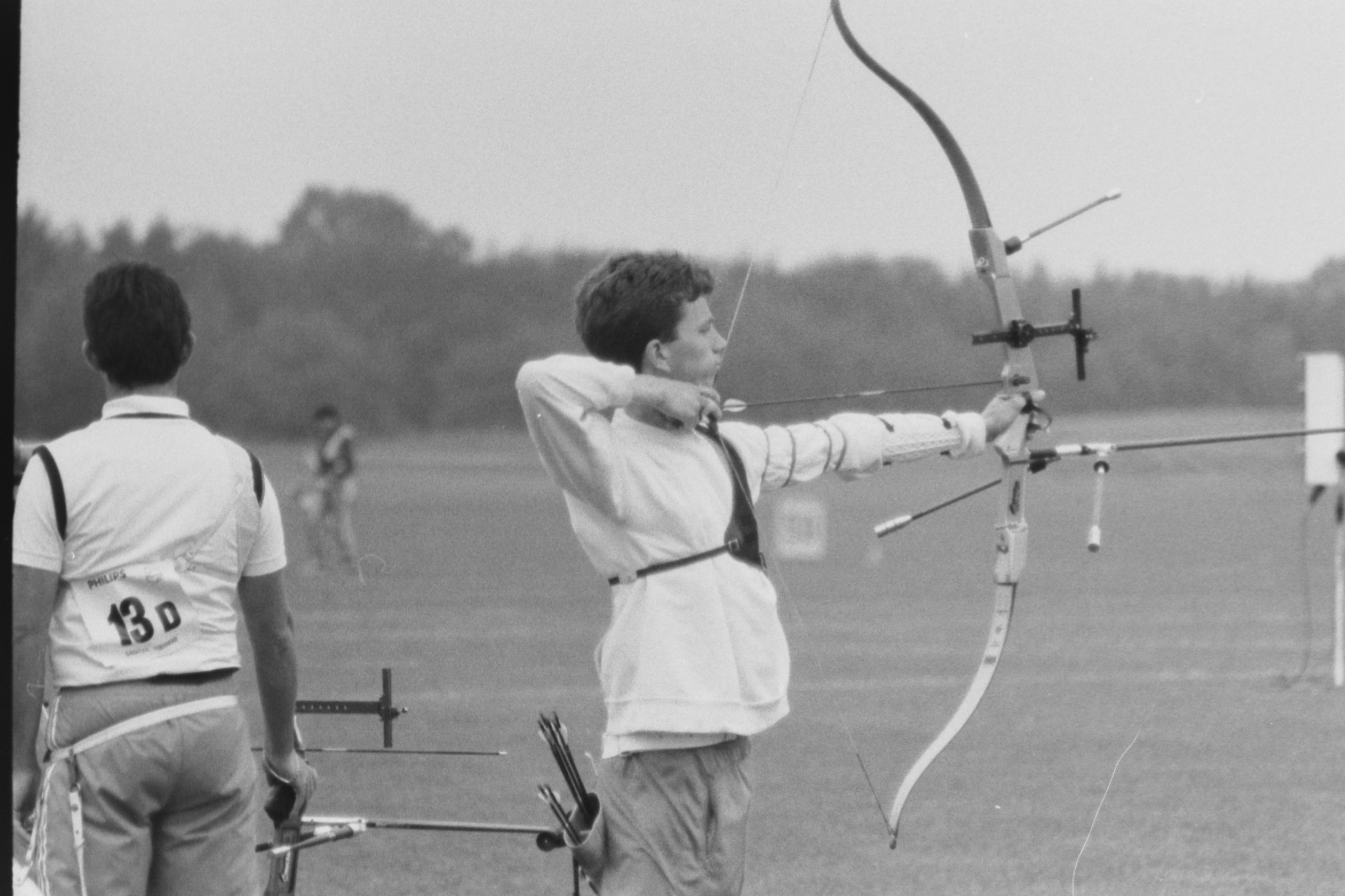 Erwin Verstegen tijdens de Sagitta-bokaal op Papendal